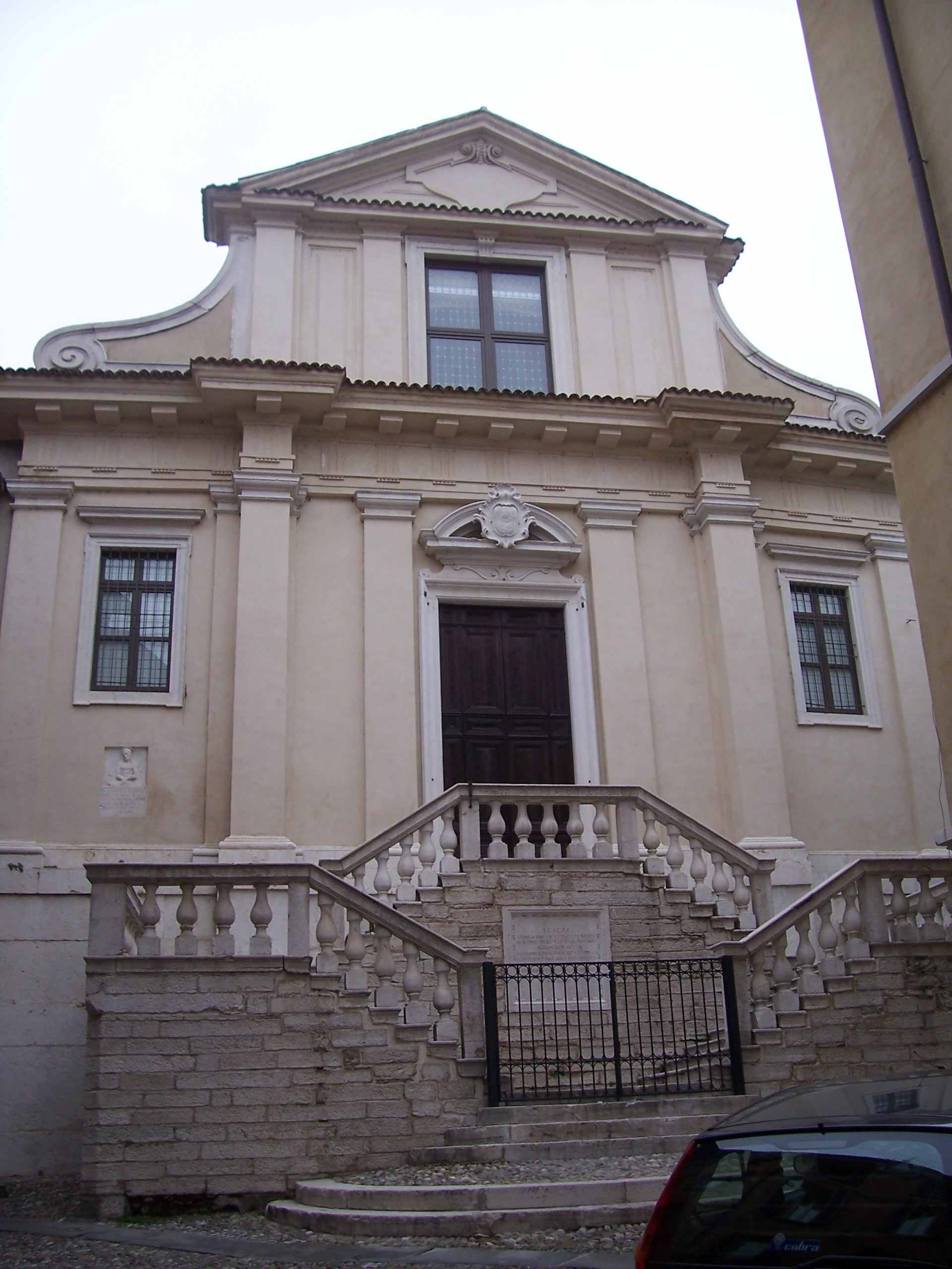 san giorgio (brescia) facciata.jpg